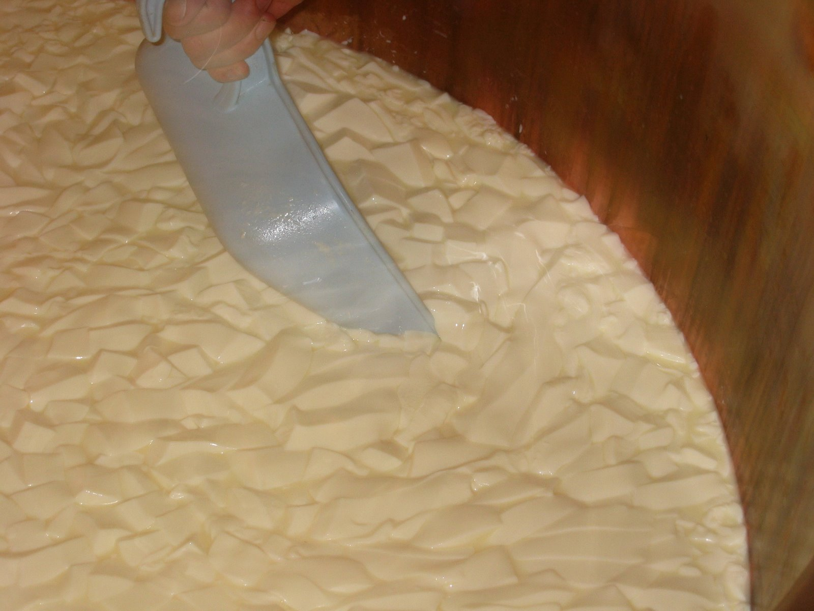 Gailtaler Almkäse g.U. von der Frondell Alm Bruch verziehen